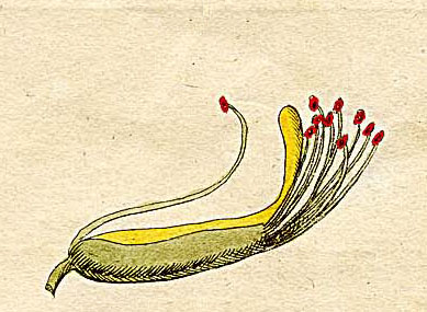 Ausschnitt (Klasse XVII) aus Ehrets Tafel "Methodus Plantarum Sexualis"